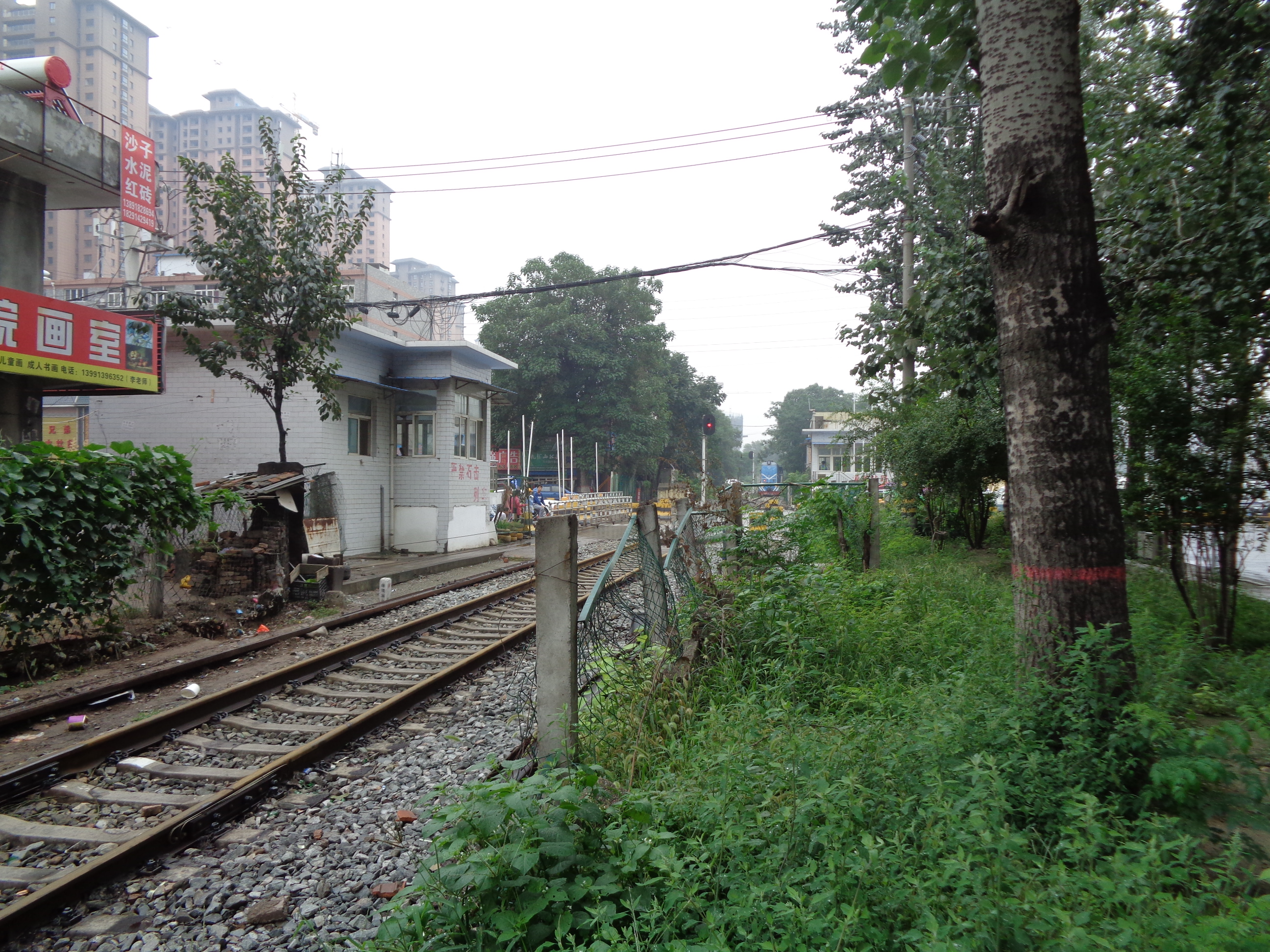 西安市莲湖区西户铁路大庆路铁路道口